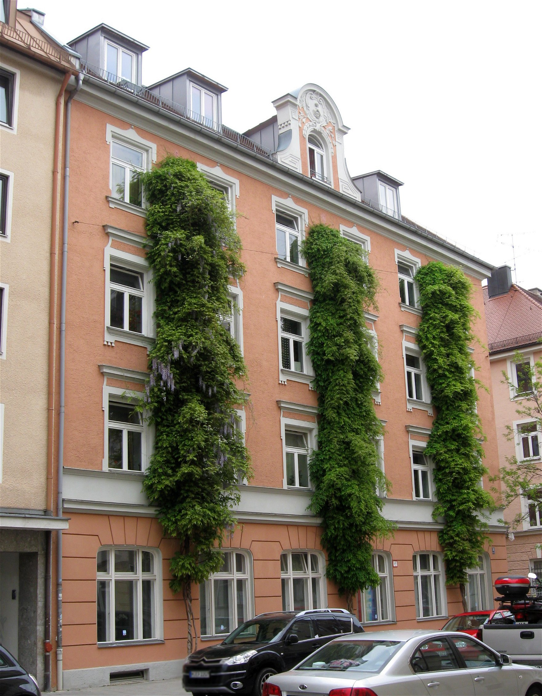 Metzstraße 31. Mietshaus, viergeschossiger Neubarockbau mit Walmdach und Stuckdekor im Zwerchgiebel (Madonna), um 1890.